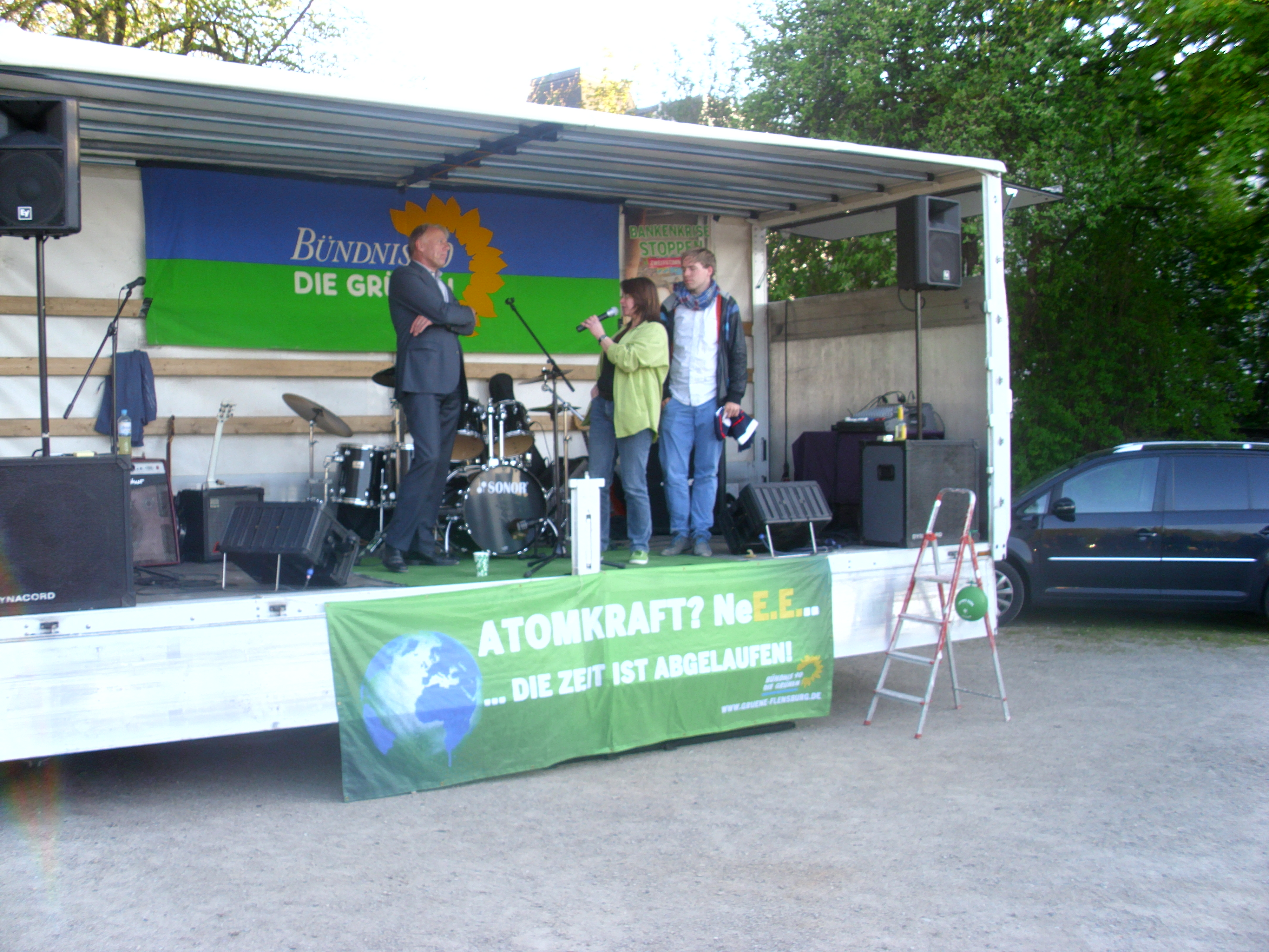 Jürgen Trittin an der Flensburger Hafenspitze mit Ellen Kittel-Wegner und Rasmus Andresen